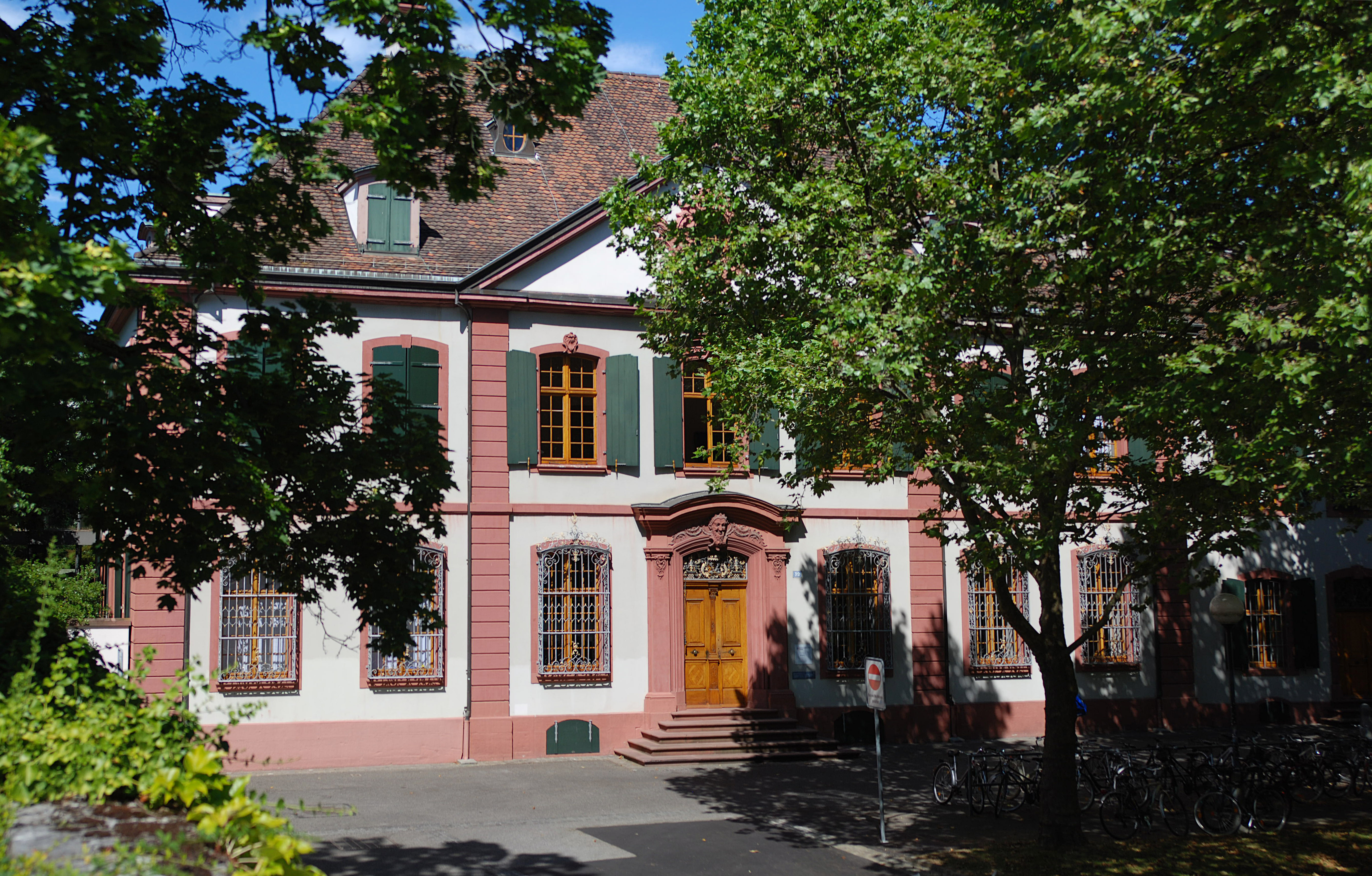 Panorama: Holsteinerhof, Basel